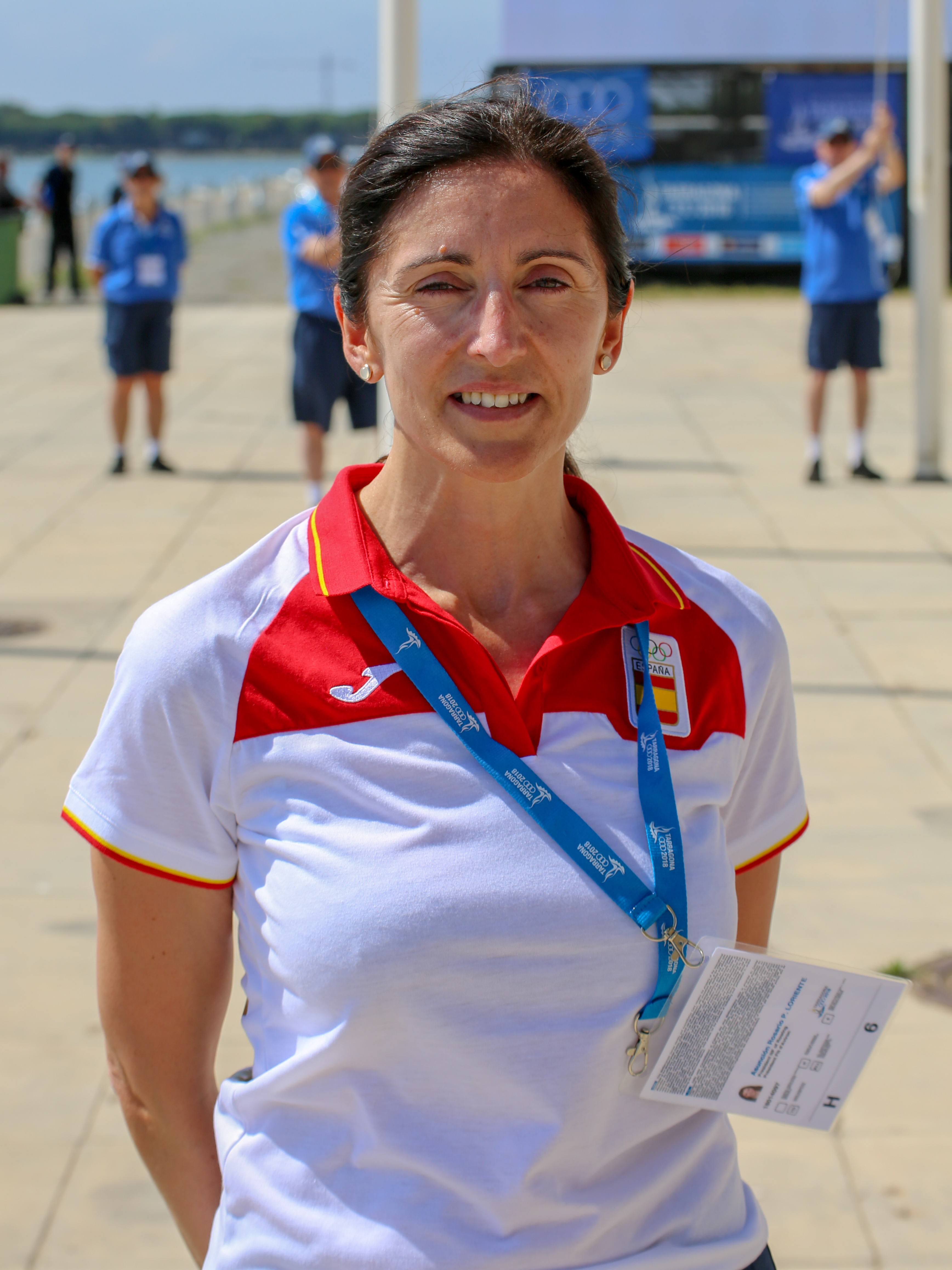 Asunción R. Loriente Pérez, presidenta de la Federación Española de Remo